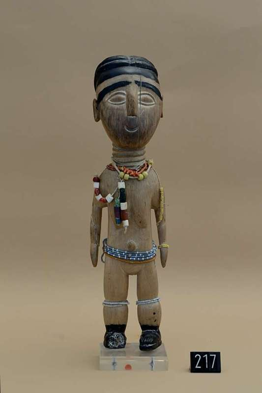 STATUA - Figura antropomorfa femminile in posizione eretta e arti disposti simmetricamente. Testa sovradimensionata rispetto alle proporzioni naturali del corpo, collo inanellato e agghindato con collane di perline. Acconciatura, sopracciglia e piedi tinti in nero, con il resto del corpo di colore chiaro e tracce di caolino (bianco) negli interstizi, in particolare intorno agli occhi. Sulla statua restano tracce di caolino. Il bianco è colore della purezza, della giovinezza e dei morti.